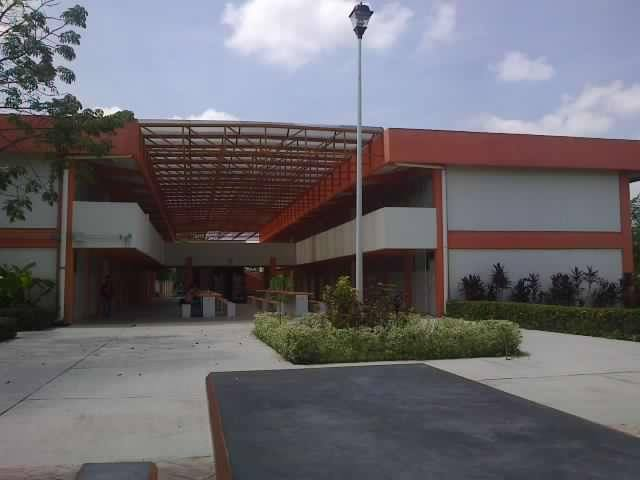 edificio